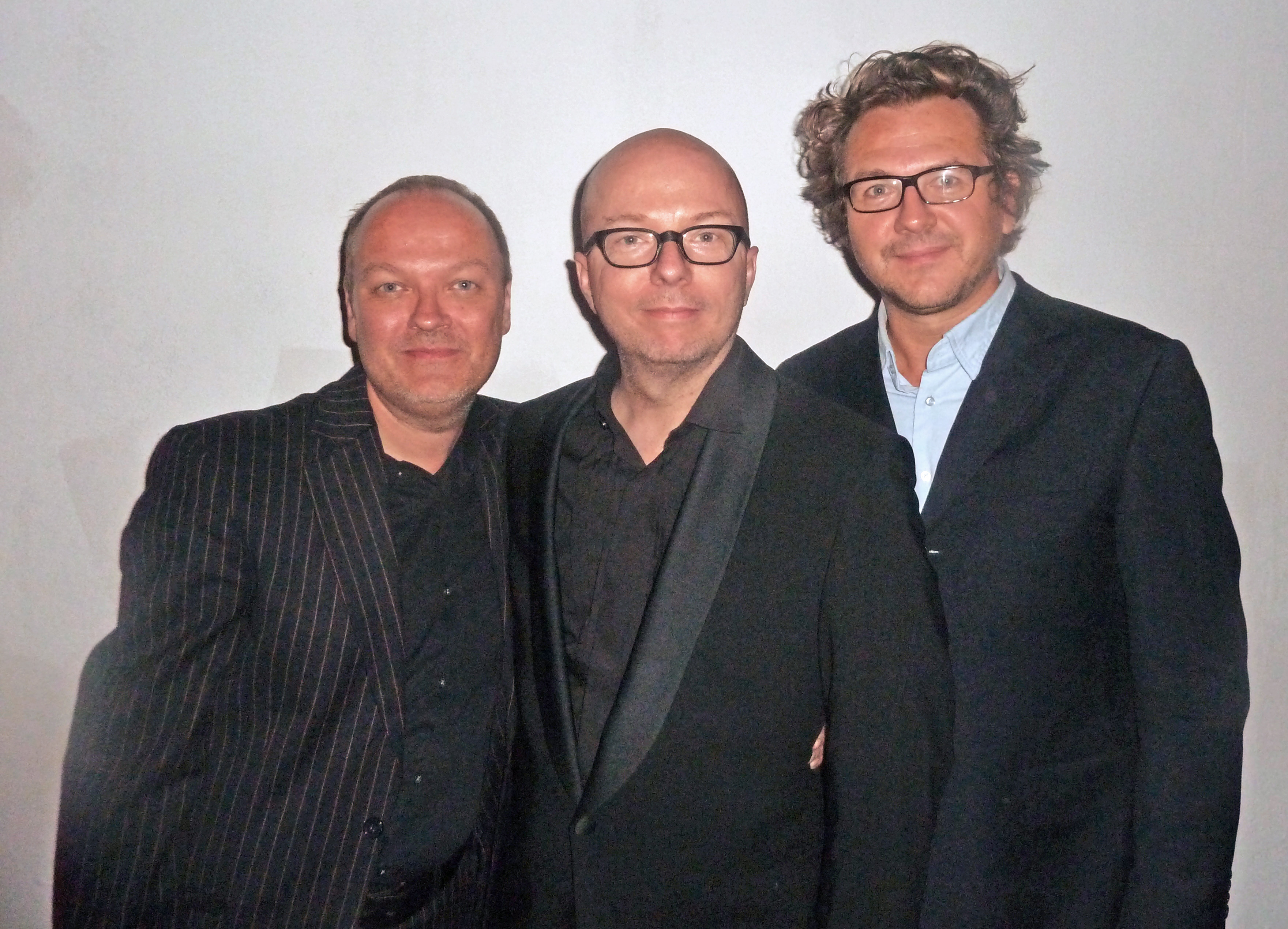 Die Sprecher der Hörspielserie "Die drei ???" nach der Record Release Party zur Folge 150 in Hamburg. Links im Bild Jens Wawrczeck als zweiter Detektiv Peter Shaw, in der Mitte Oliver Rohrbeck als erster Detektiv Justus Jonas, rechts Andreas Fröhlich als dritter Detektiv Bob Andrews.